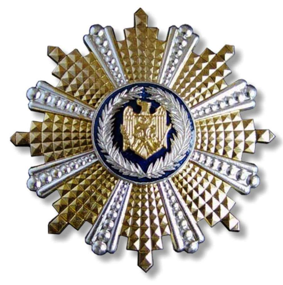 Орден Почёта Молдовы